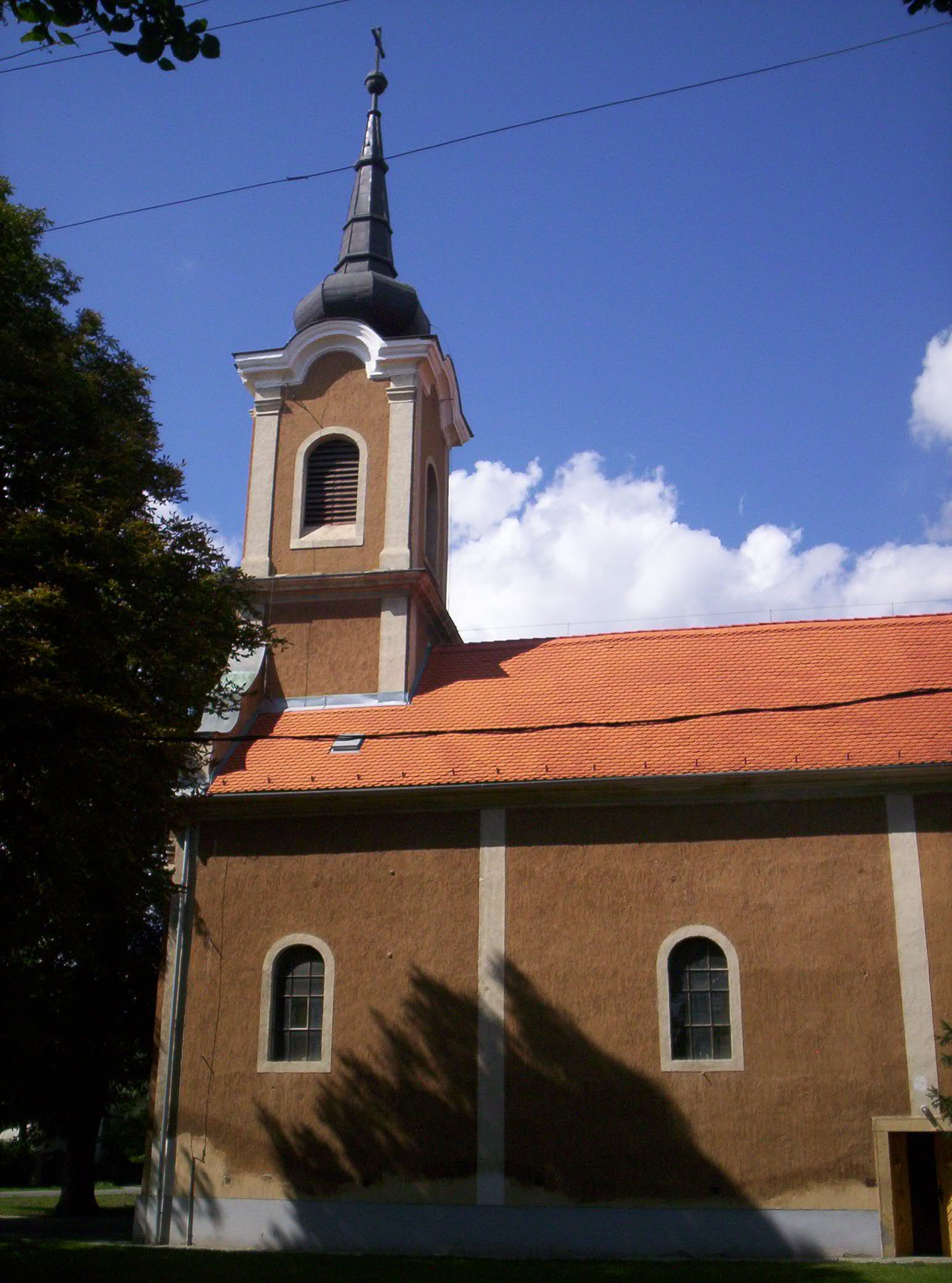 Szent Lőrinc tiszteletére 1718-ban emelt templom Szentlőrincen. A barokk stílusú temmplomot 1884-ben átalakították. – photo taken by uploader User:Csanády in 2006.